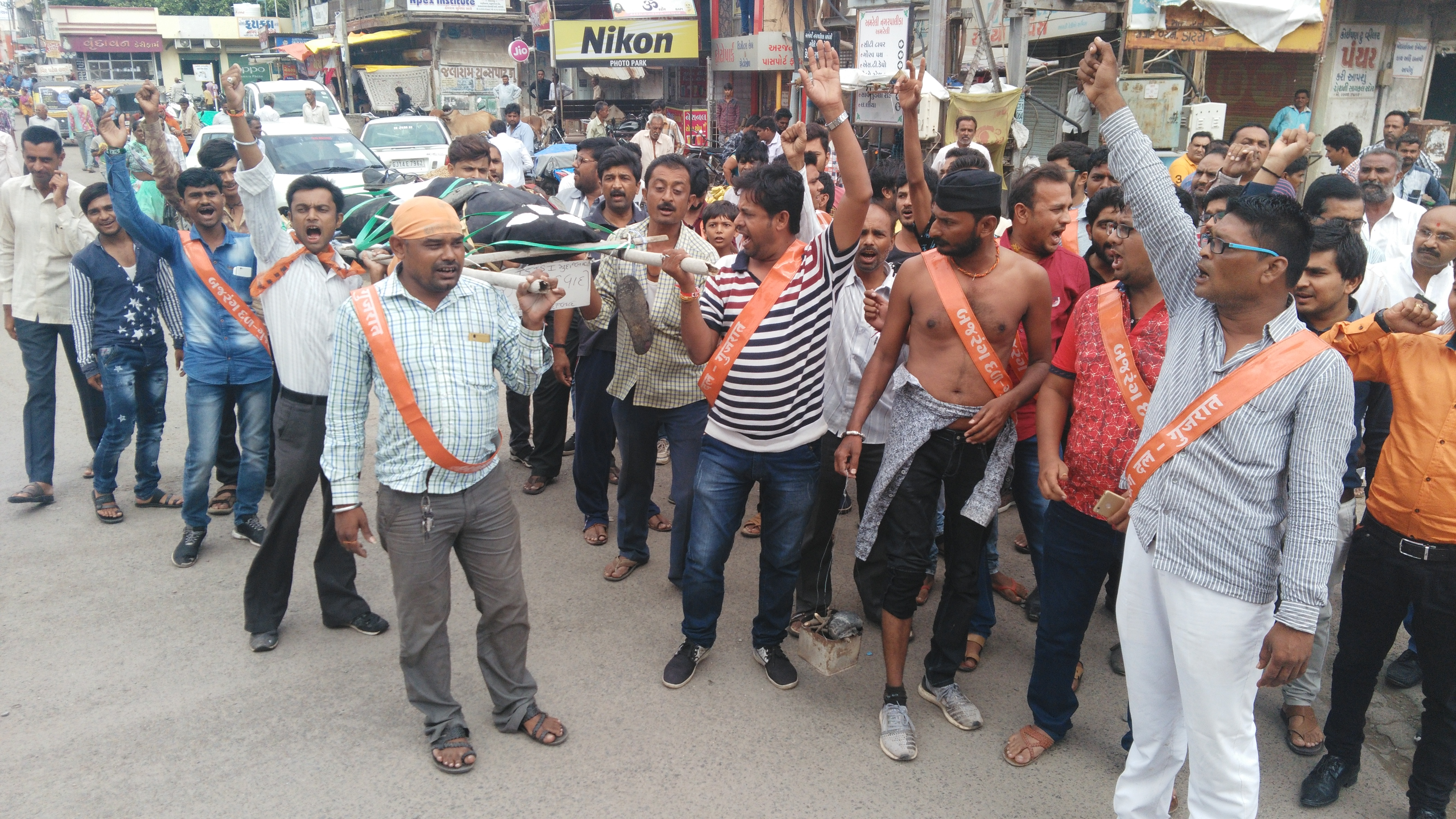 अमरनाथ यात्रा पे हमले का विरोध।